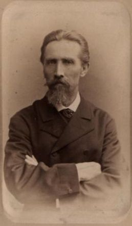 Александр Иванович Морозов. Фотография.